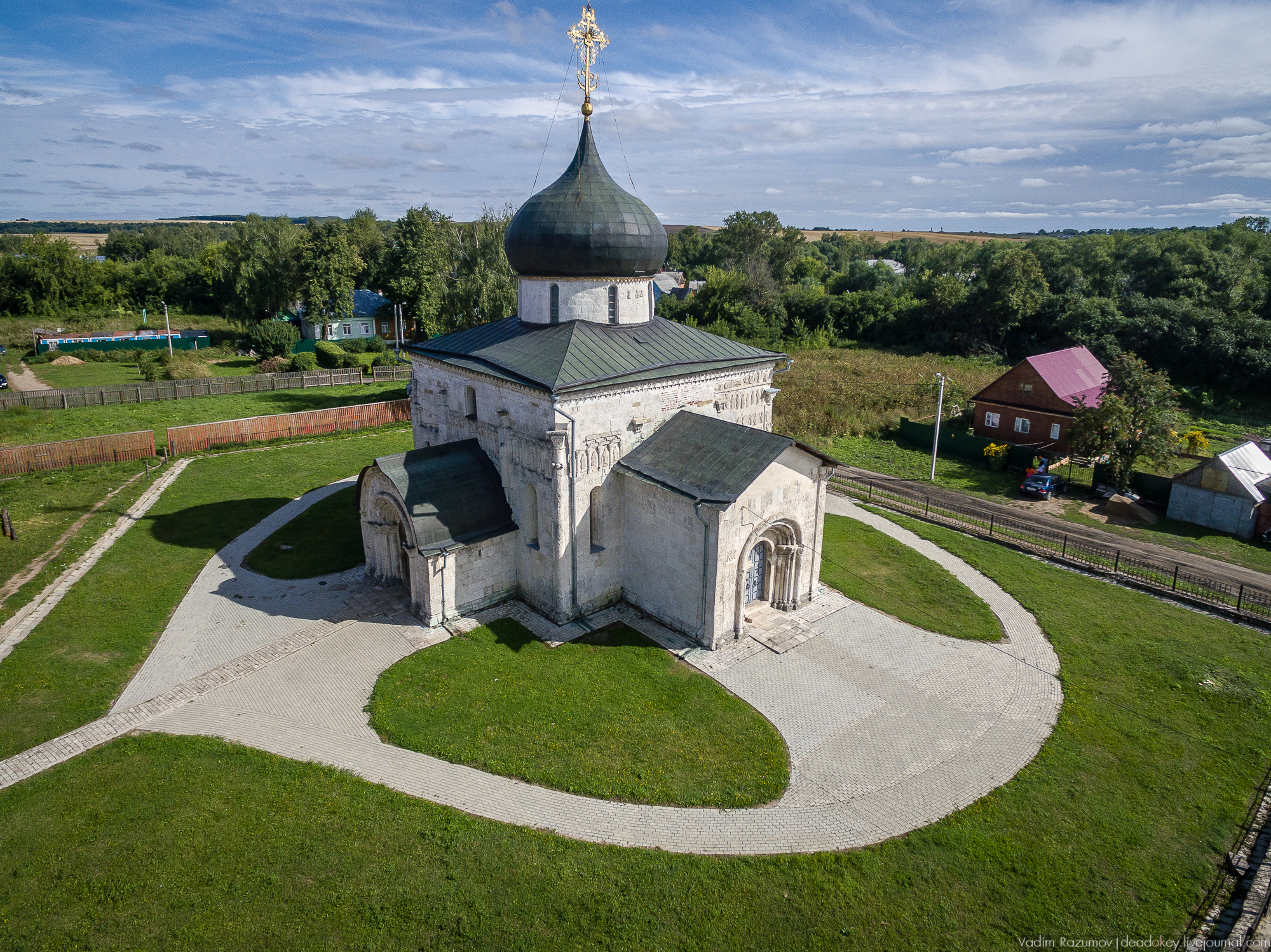 Собор Георгиевский (Георгиевский собор и земляные валы городища): улица 1 Мая, Юрьев-Польский, Юрьев-Польский район, Владимирская область